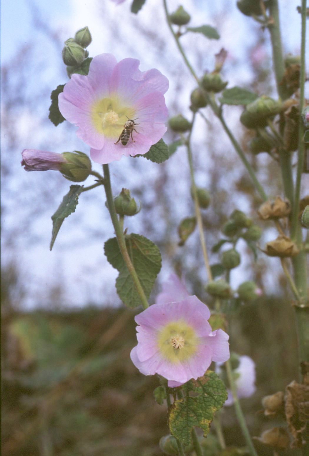 Blasse Stockrose (Alcea biennis Winterl), Malvengewächse (Malvaceae) - Österreich/Austria/Autriche: Niederösterreich, Weinviertel, Pulkautal, N Zellerndorf